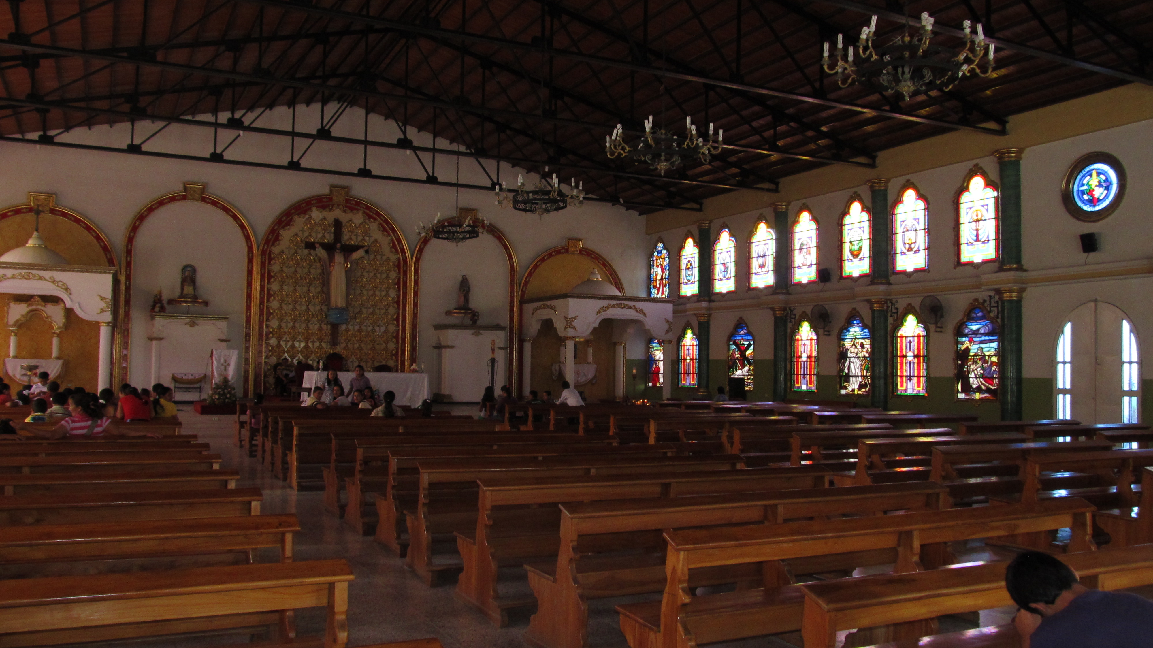 Foto tomada dentro de la Iglesia Cristo Rey, ubicada en la ciudad de Socopó (Venezuela)